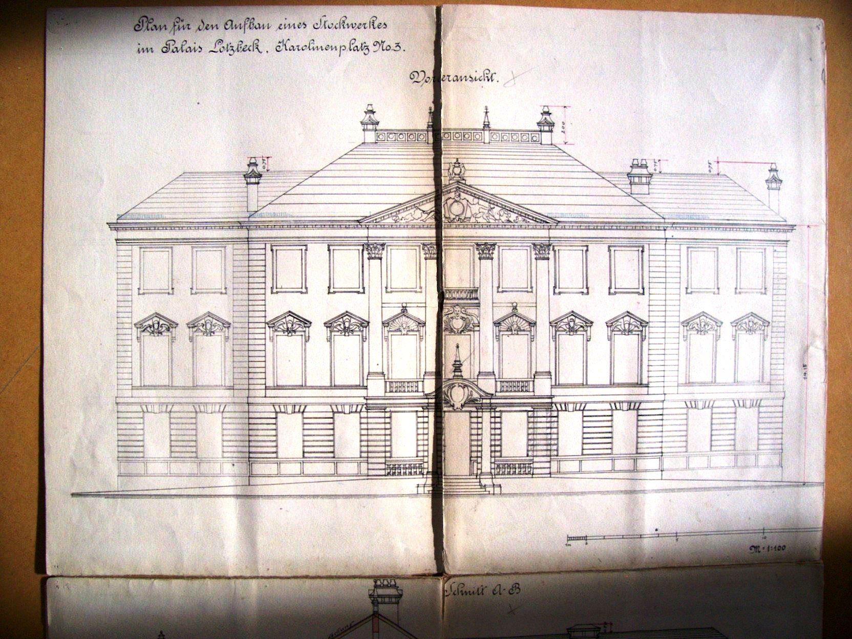 Palais Lotzbeck, Aufnahme aus dem Akt der Lokalbaukommission im Stadtarchiv München, 18.9.2014